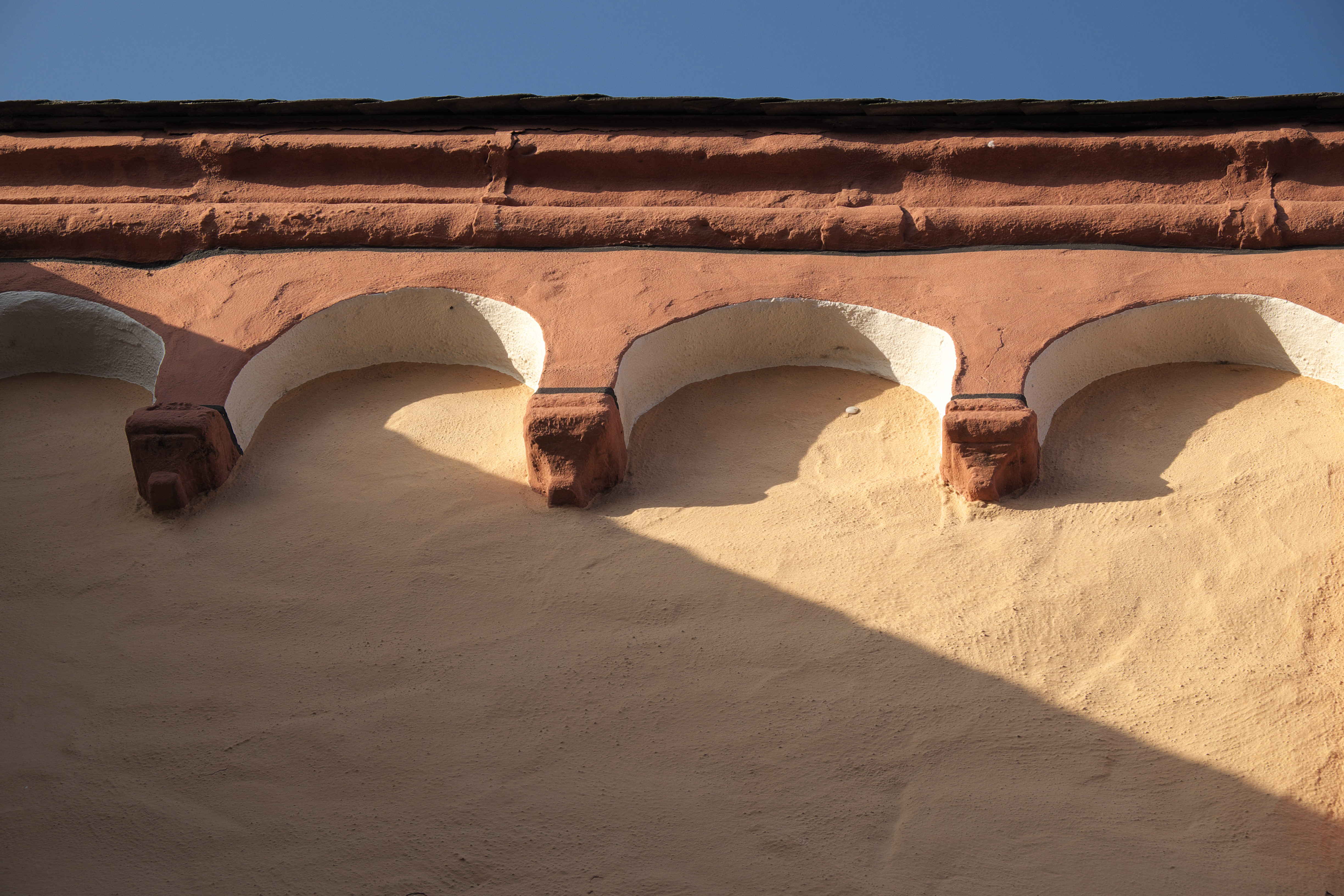 Katholische Pfarrkirche St. Georg in Frauenberg im Kreis Euskirchen in Nordrhein-Westfalen (Deutschland), Blendbögen